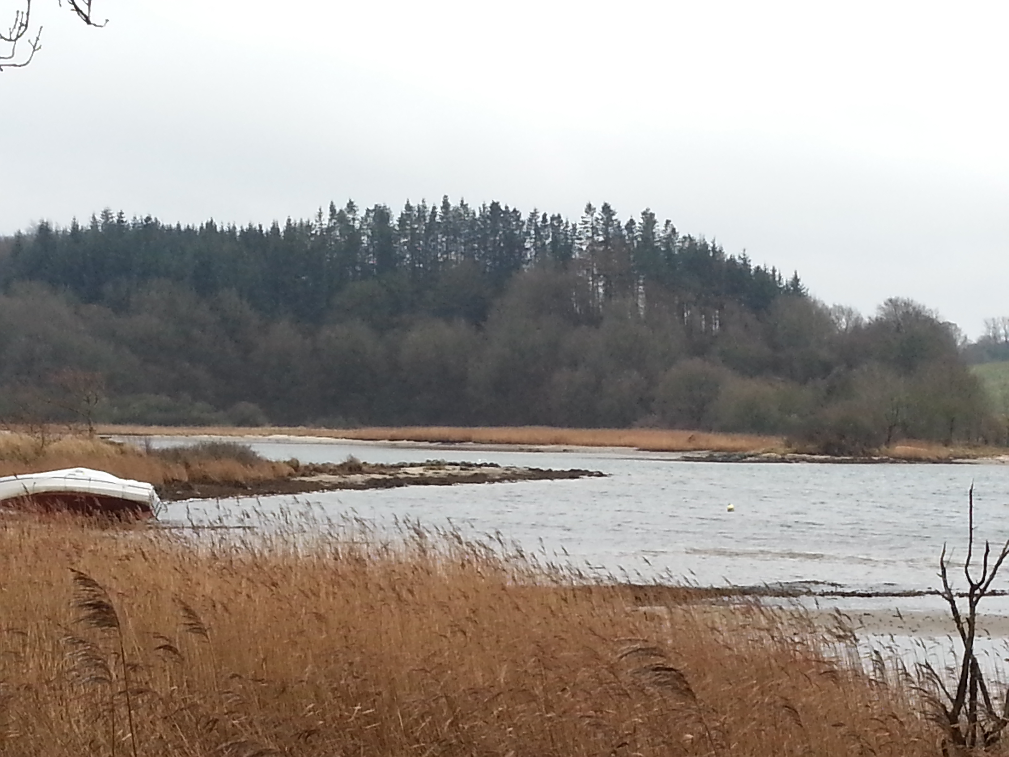 Dæmningen ved Eltang Vig set fra Hovens Odde (NV fra dæmningen)